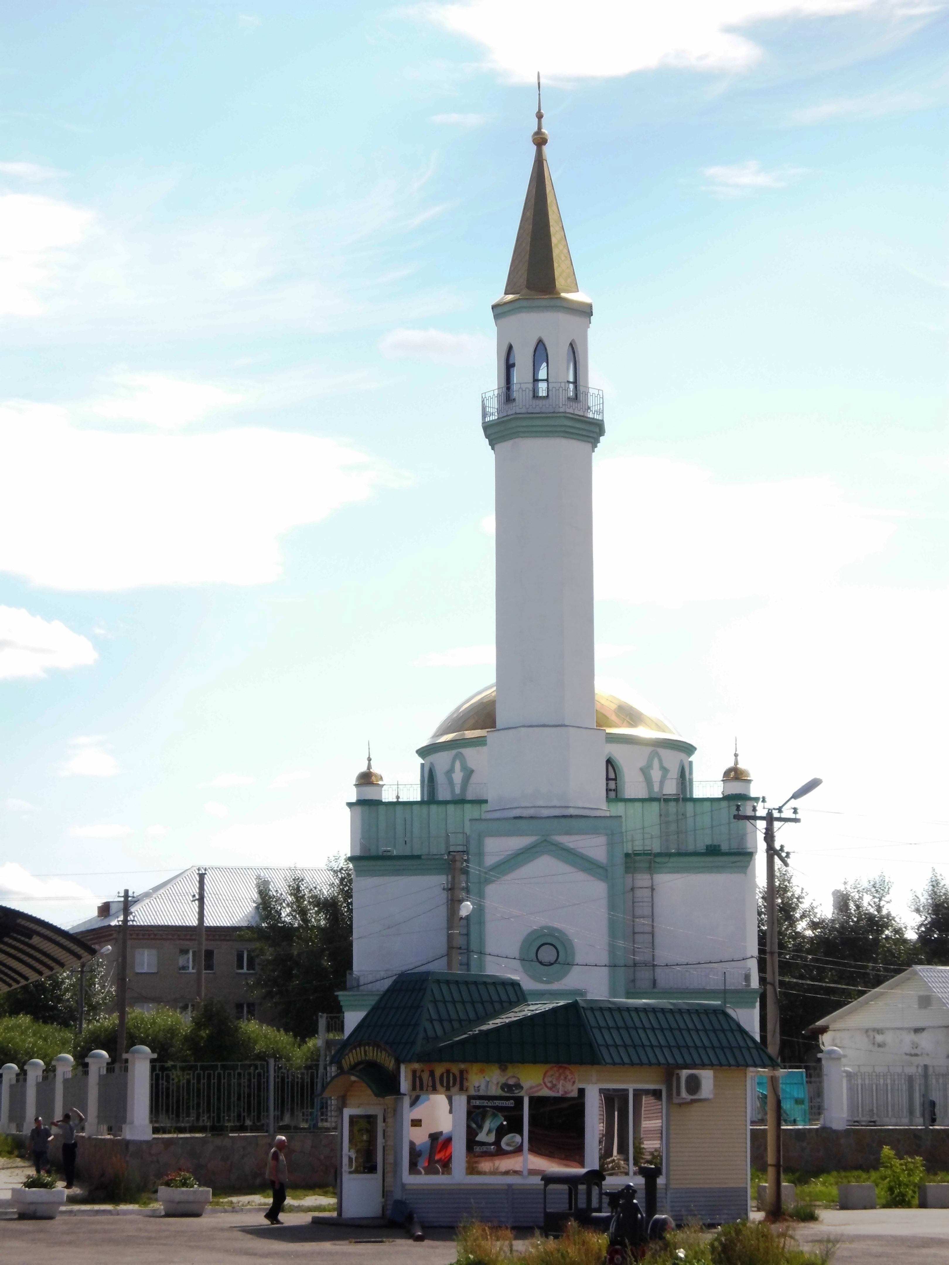 Россия, Челябинская область, г. Кыштым. Мечеть возле железнодорожной станции Кыштым ЮУЖД.